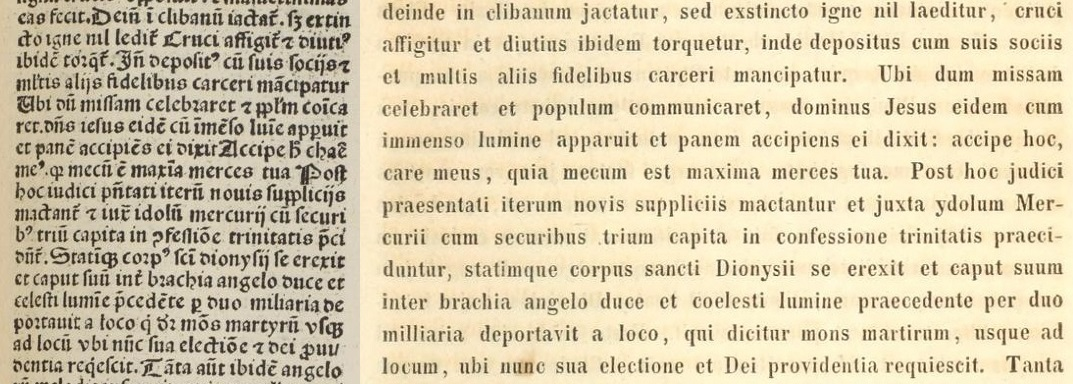 Legenda Aurea, Schluss des Dionysiusmartyriums in zwei Druckfassungen:Darauf wird er in einen Backofen geworfen, aber das Feuer verlischt und er bleibt unverletzt. Er wird an ein Kreuz geheftet und längere Zeit dort gequält. Von dort abgenommen, wird er mit seinen Gefährten und vielen anderen Gläubigen in einen Kerker gesperrt. Als er dort die Messe feierte und dem Volk die Kommunion reichte, erschien ihm Jesus der Herr in strahlendem Licht, nahm das Brot und sagte zu ihm: Empfange dies, mein Teurer, denn bei mir ist dein übergroßer Lohn. Danach dem Richter vorgeführt, werden sie wieder mit neuen Strafen gepeinigt, und beim Götzenbild des Merkur werden die Köpfe der Drei mit Axthieben abgeschlagen zum Bekenntnis der Dreifaltigkeit. Und sofort erhob sich der Körper des heiligen Dionysius und trug seinen Kopf in den Armen, geführt von einem Engel und von himmlischem Licht geleitet, zwei Meilen weit von dem Ort, der Märtyrerberg heißt, bis zu der Stelle, wo er nun nach eigener Wahl und Gottes Vorsehung ruht.